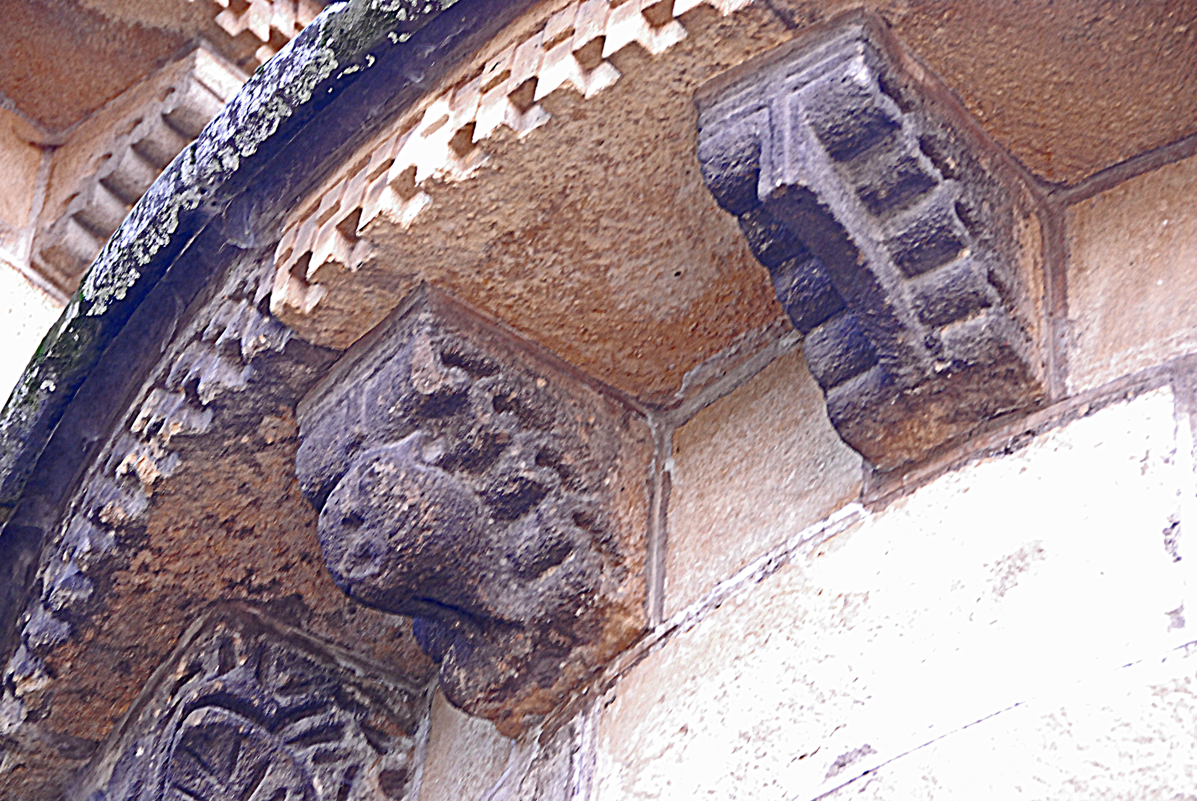 St-Saturnin (Puy-de-Dôme), Traufgesims Querhauskapelle